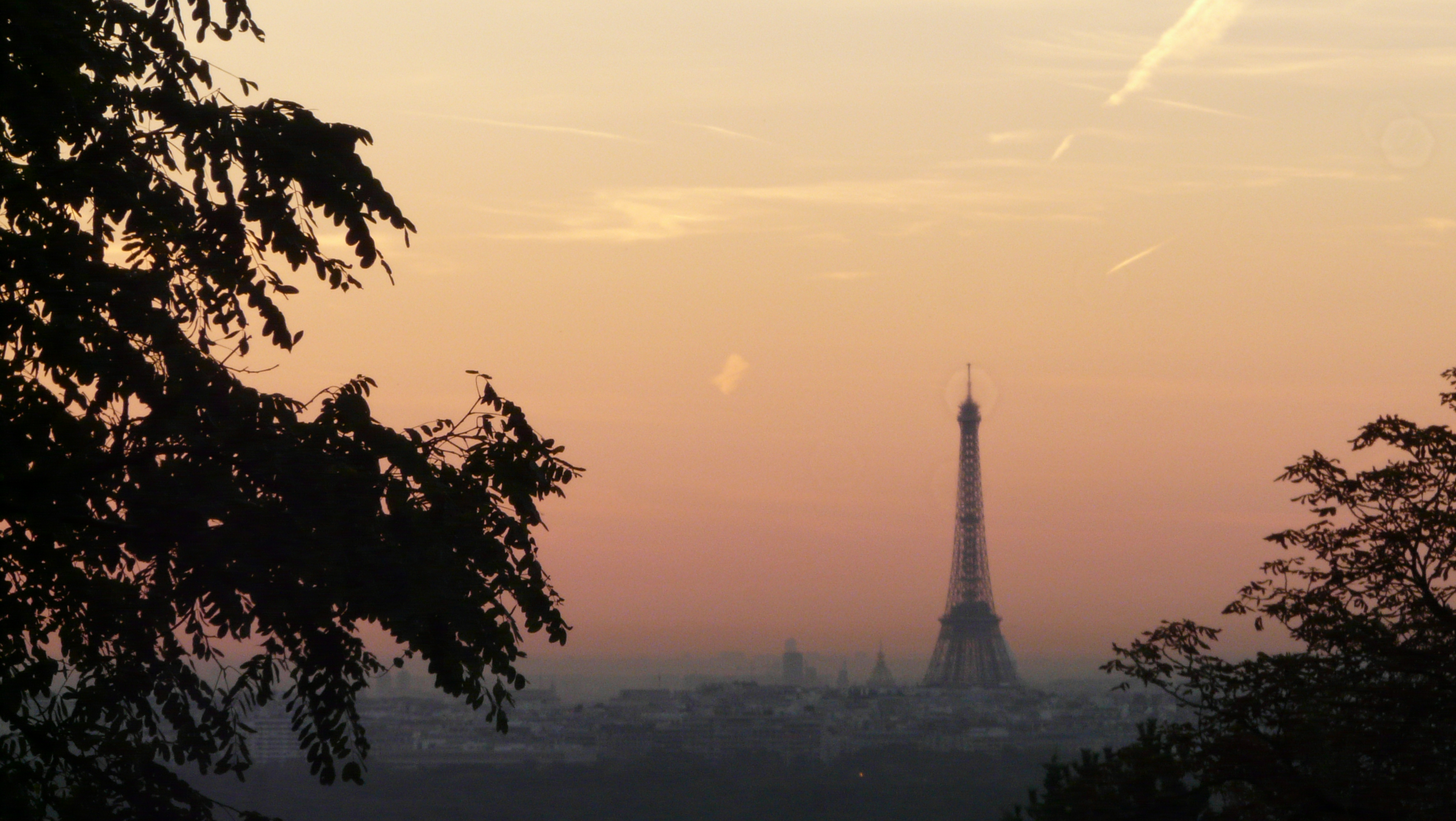 Tour Eiffel vue de l'ouest Parisien (matinée de fin d'été)